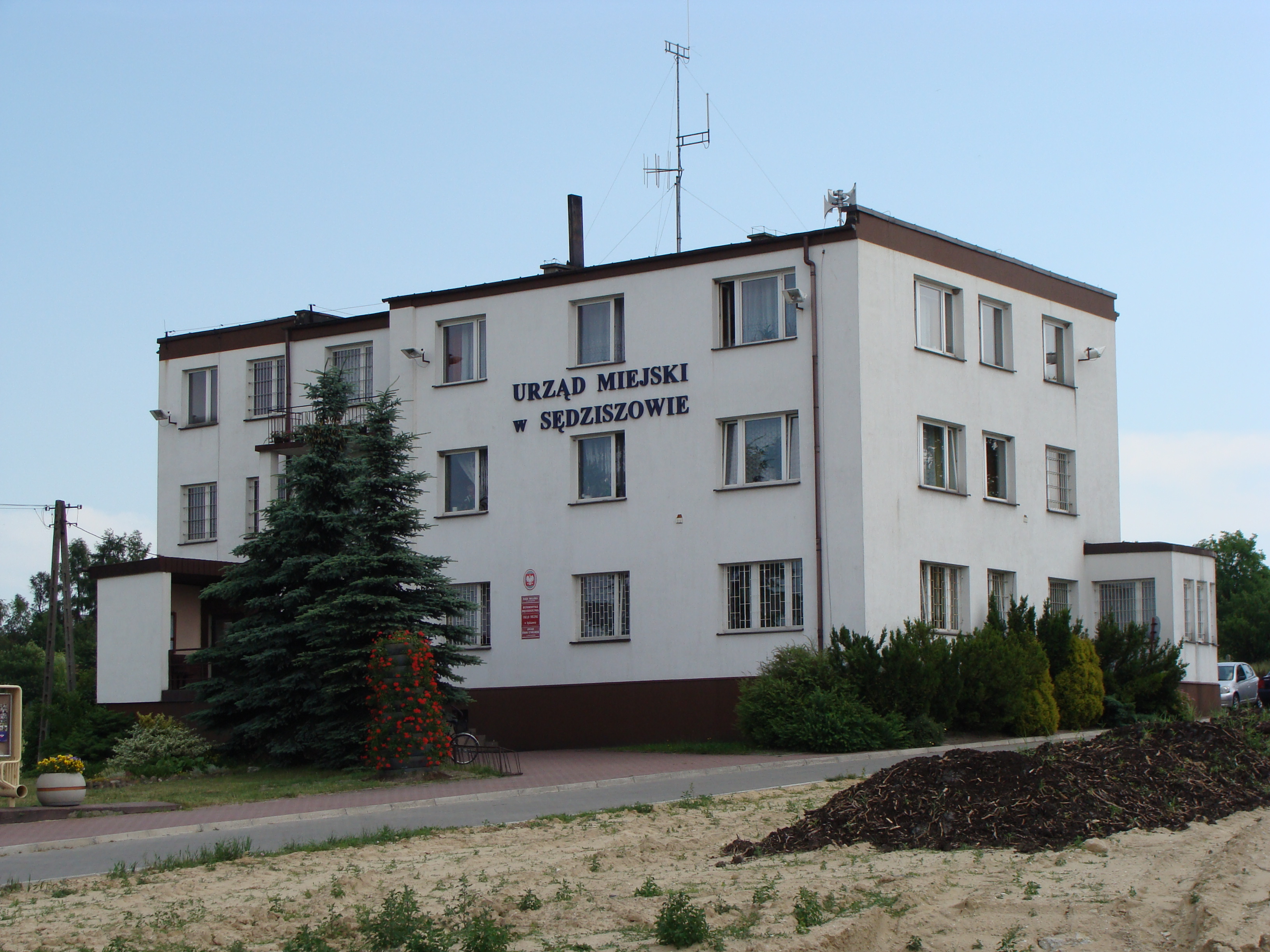 Sędziszów - Urząd Miasta i Gminy Sędziszów